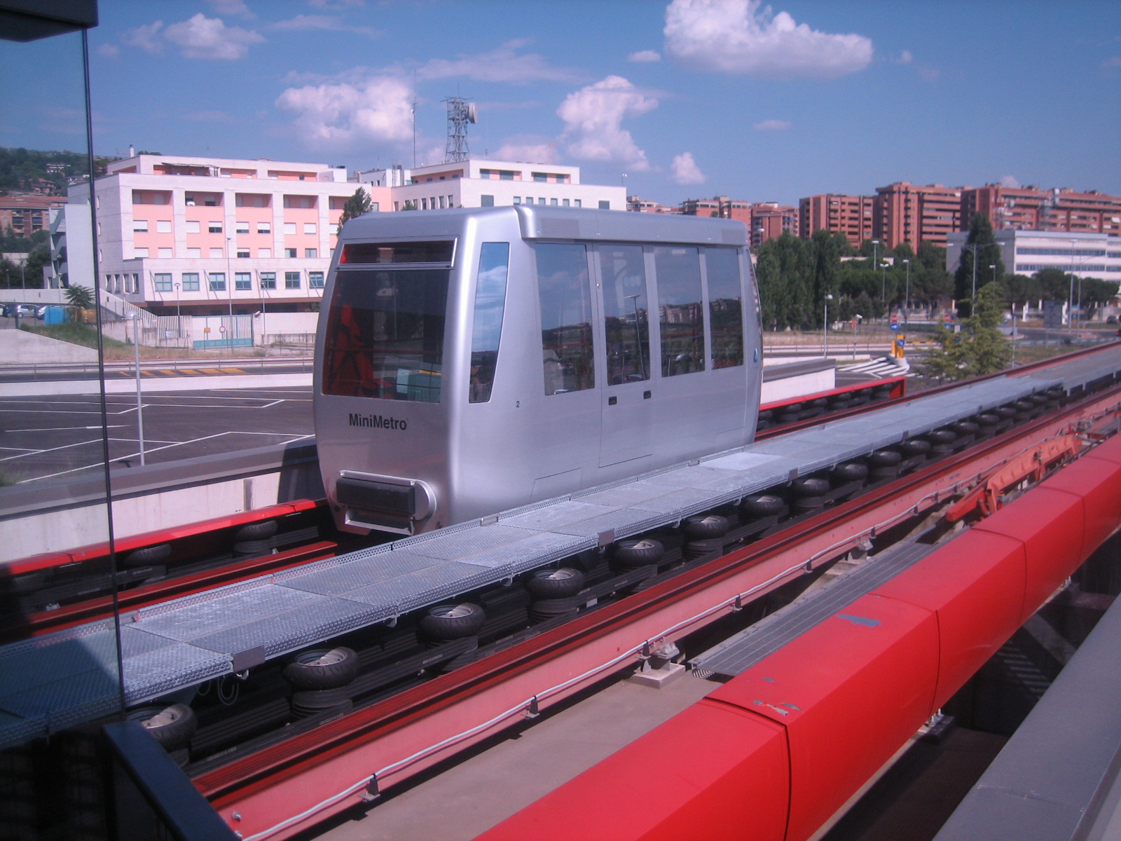 una cabina del minimetrò vista di lato